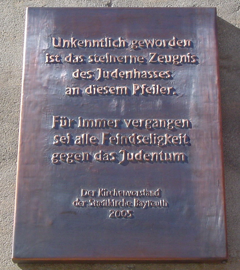 Stadtkirche Heilig Dreifaltigkeit Bayreuth. Die Gedenktafel (2005) unter der zerstörten Judensau-Skulptur an der Außenmauer de Kirche.